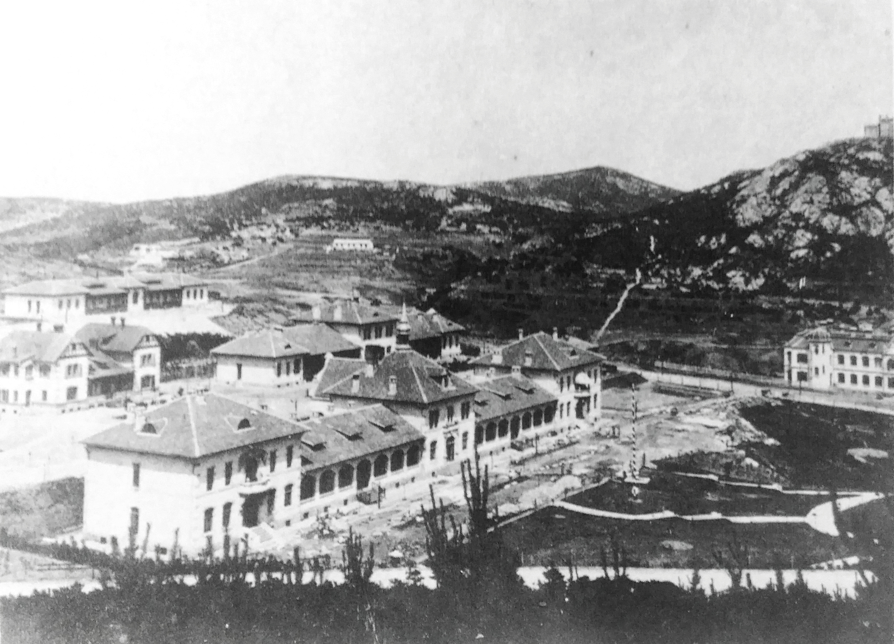 青岛督署医院